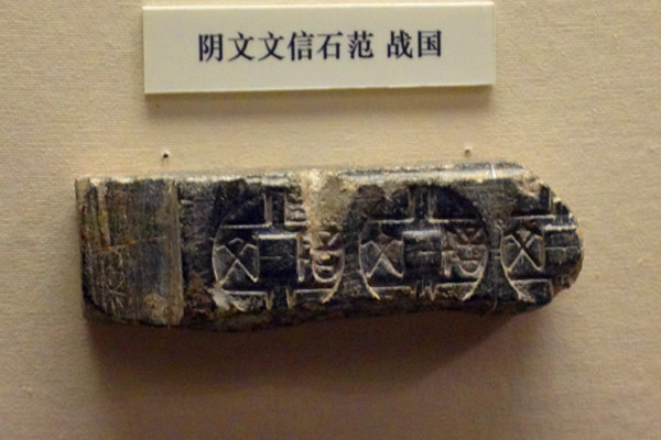 文信圜钱的阴文石范，战国文物，拍摄于中国国家博物馆